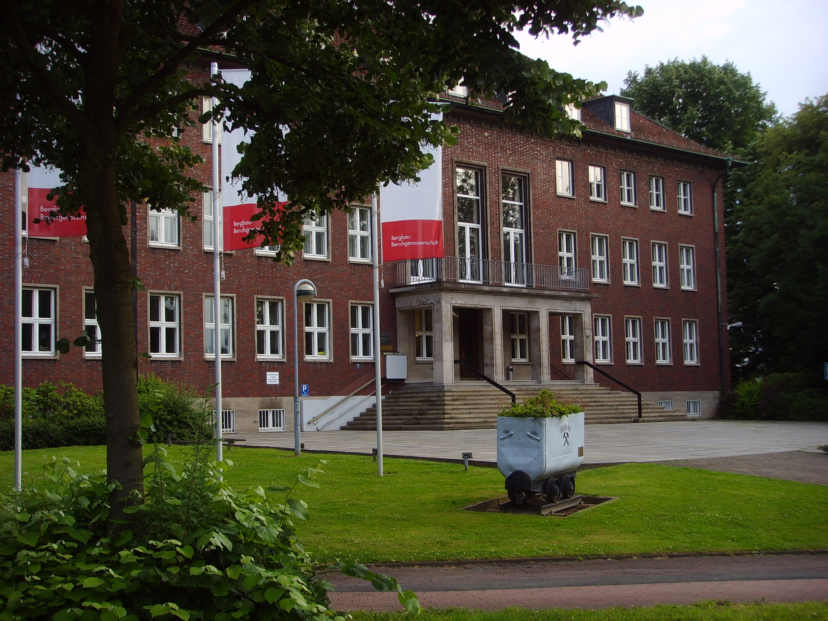 Bezirksverwaltung Bochum der Bergbau-Berufsgenossenschaft, Waldring 97, 44789 Bochum Source: own work Date: 15 June 2008, Bochum, Germany Author: Maschinenjunge Licence: GFDL, cc-by 3.0 de: Bergbau-Berufsgenossenschaft